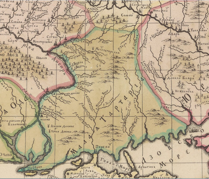 Карта Брюса-Менгдена, печатный вариант Яна Тессинга, 1699 год